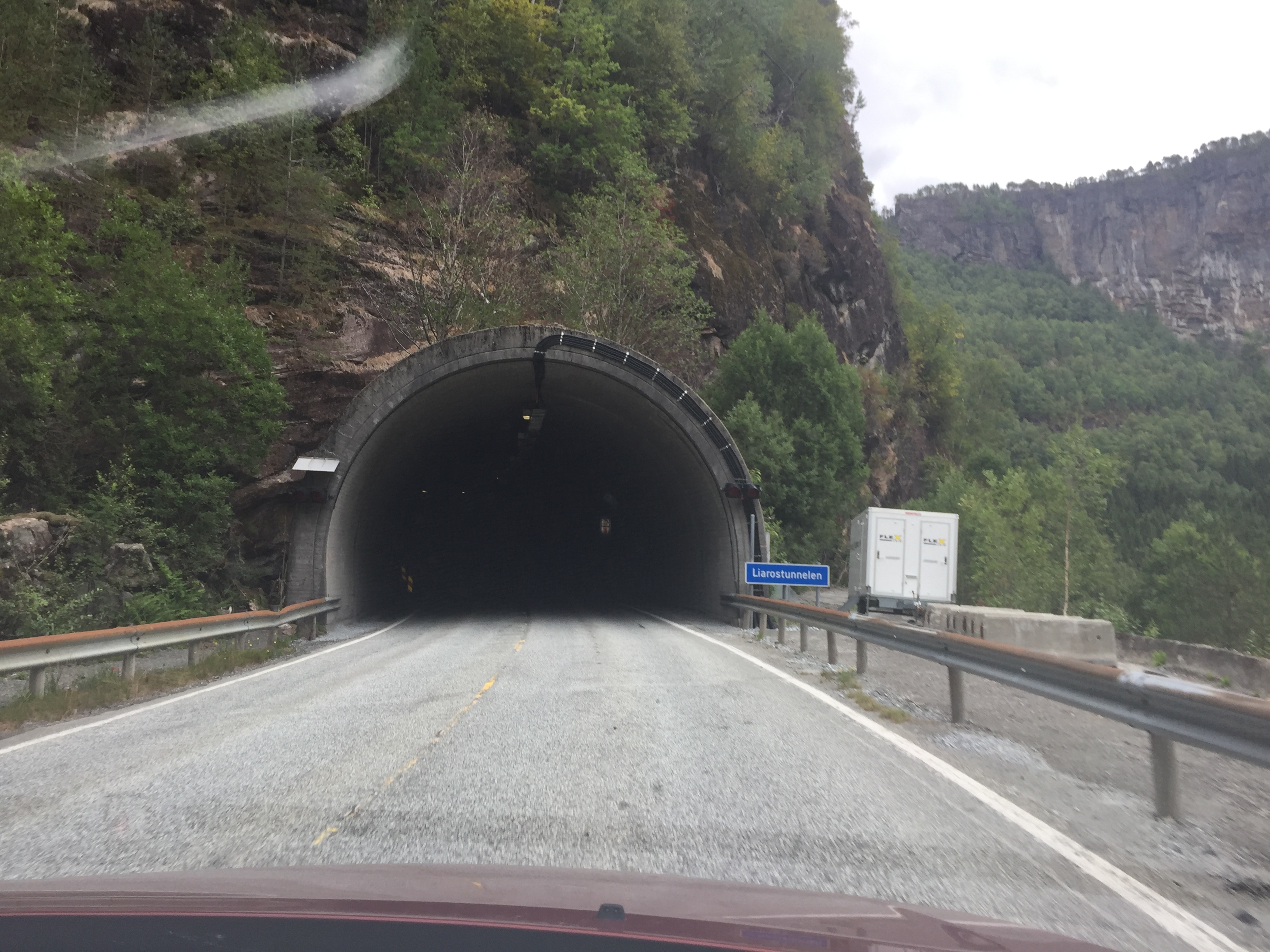 Liarostunnelen